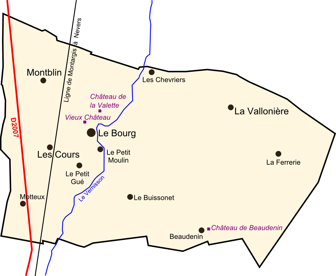 Carte des principaux hameaux de la commune de Pressigny-les-Pins, département du Loiret. France